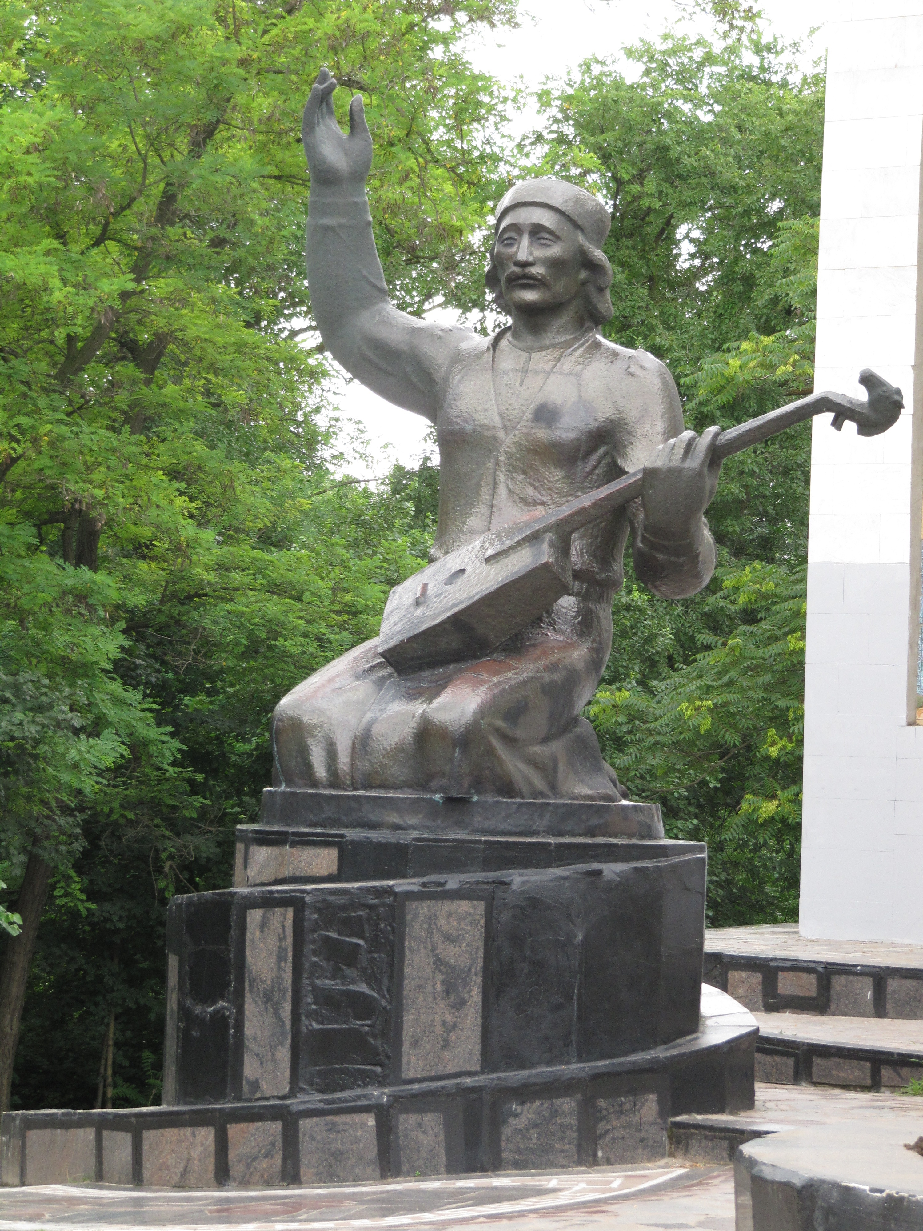 Памятник джангарчи в парке "Дружба", Элиста, Калмыкия